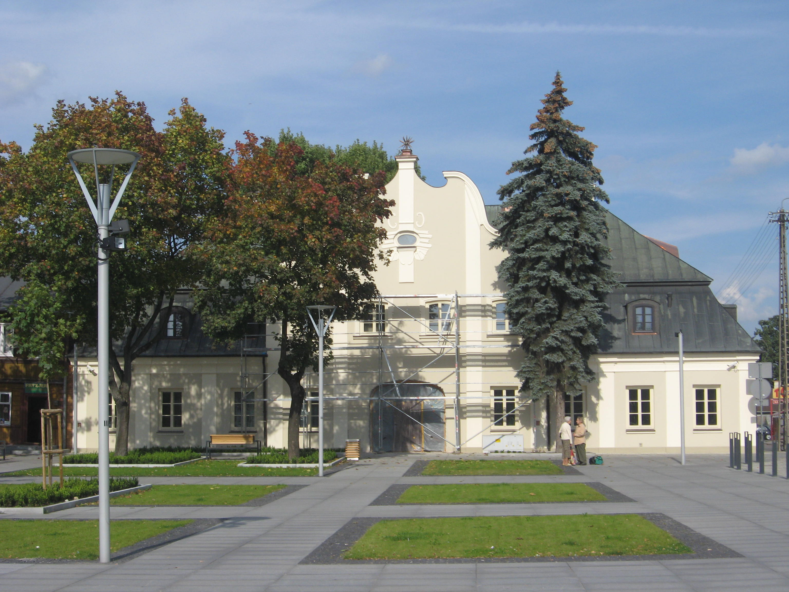 Węgrów, Rynek 11 - zajazd „Dom Gdański”, ob. biblioteka, 1 poł. XVIII, 1980 (zabytek nr 176)